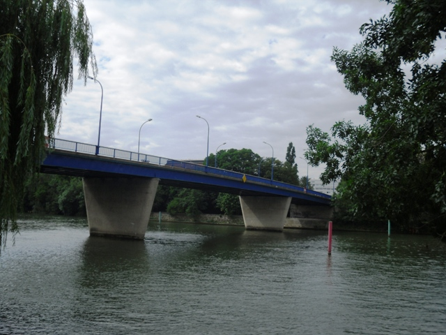 Le pont de Champrosay sur la Seine à Draveil (91)